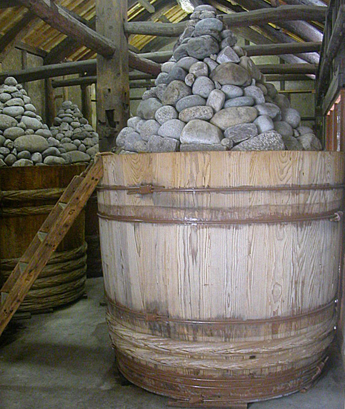 撮影者：小太刀 まるや八丁味噌にて撮影 八丁味噌の仕込蔵の木桶。